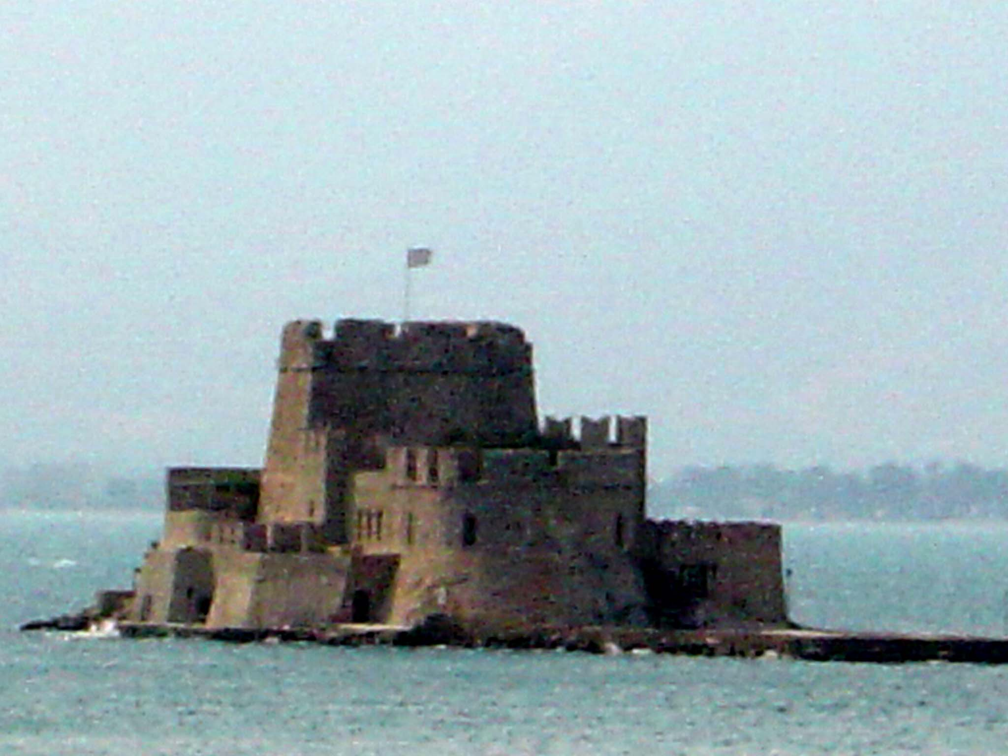 Vue vu Nafplio an dem Schlass (2005).